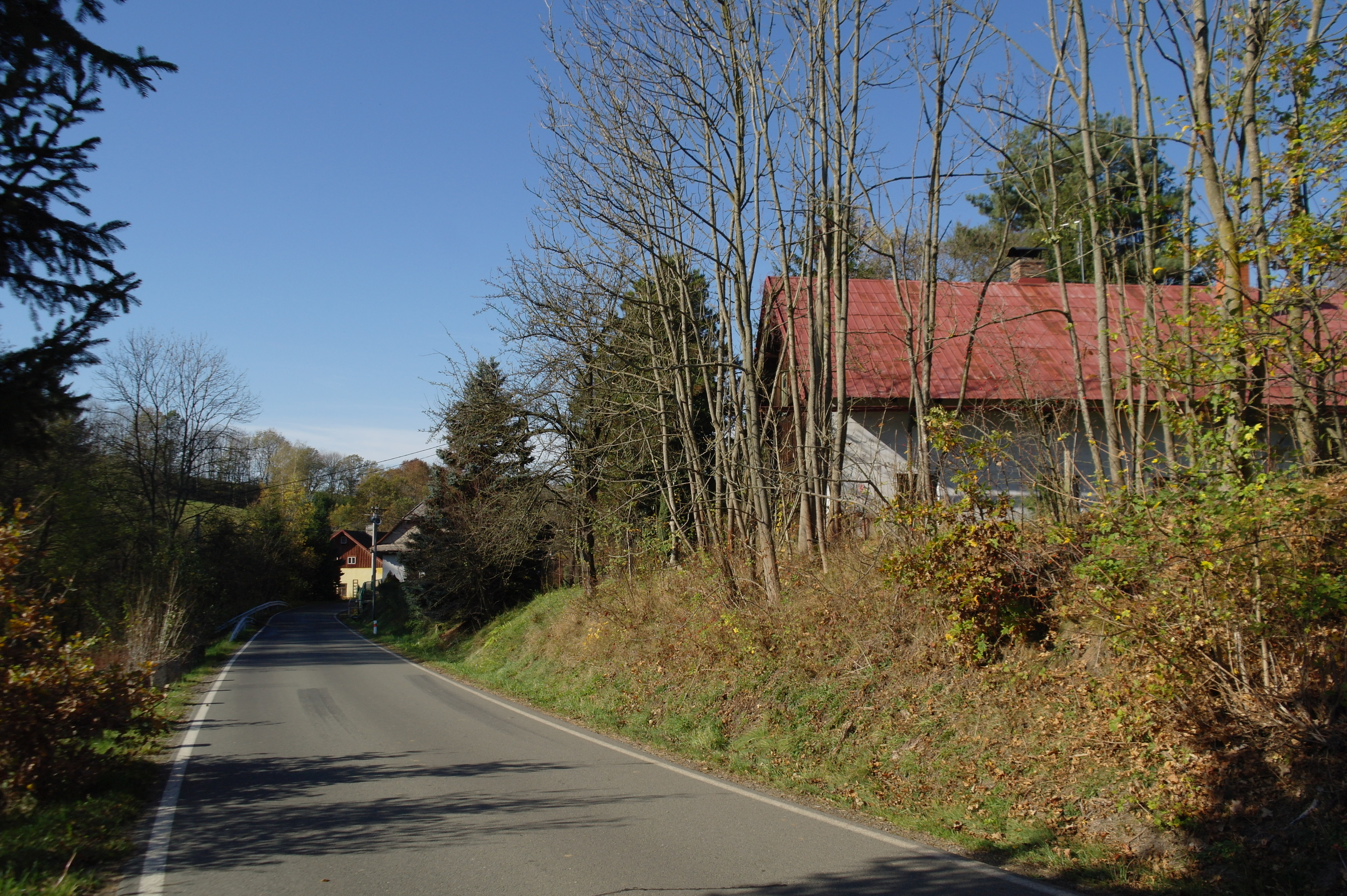 Silnice ve vesnici Debřece, Královéhradecký kraj Project: Fotíme Česko